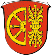 Wappen von Spangenberg (Hessen)